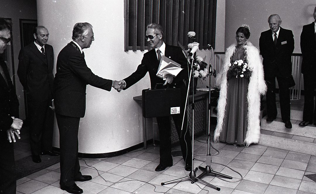 Heideweek 1975. Ontvangst van de heidekoningin en haar gevolg op het gemeentehuis van Ede aan de Raadhuisstraat.